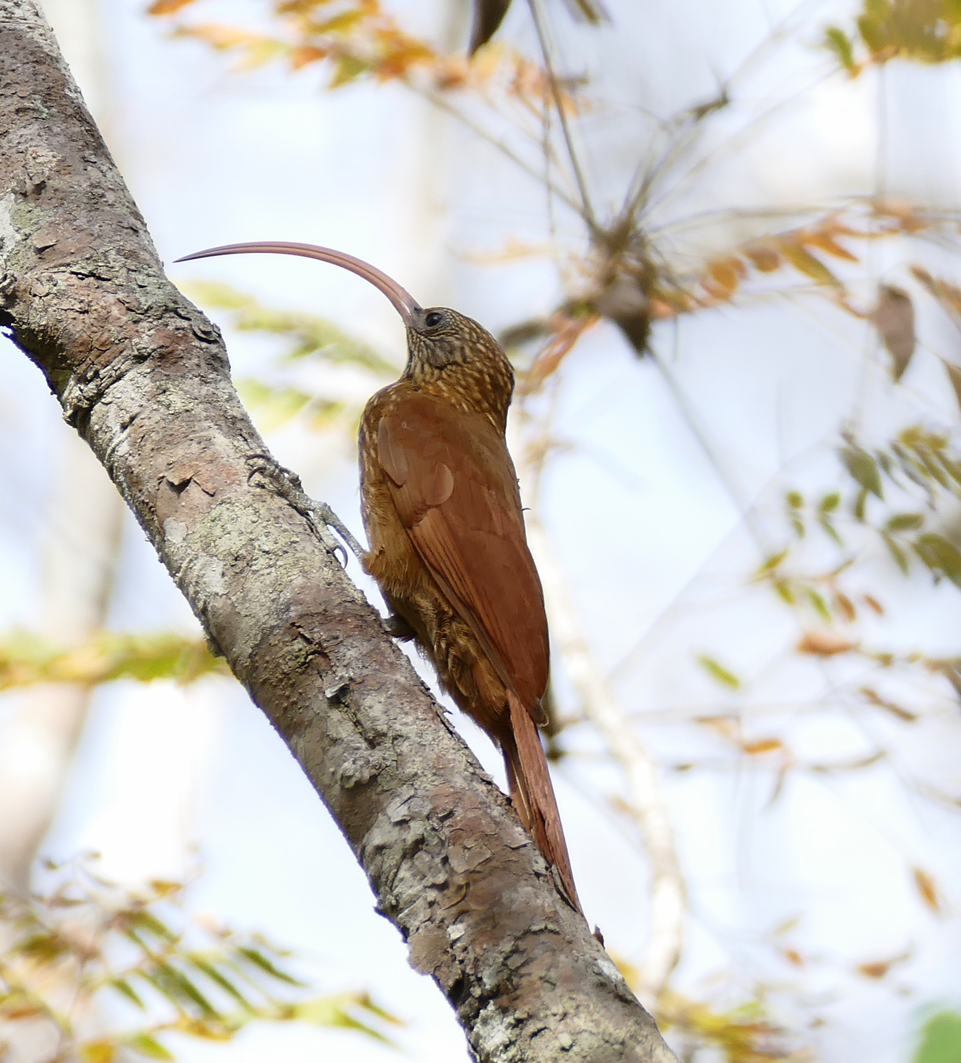 Pousada Rio Claro, Transpantaneira, Poconé, Mato Grosso, BRAZIL